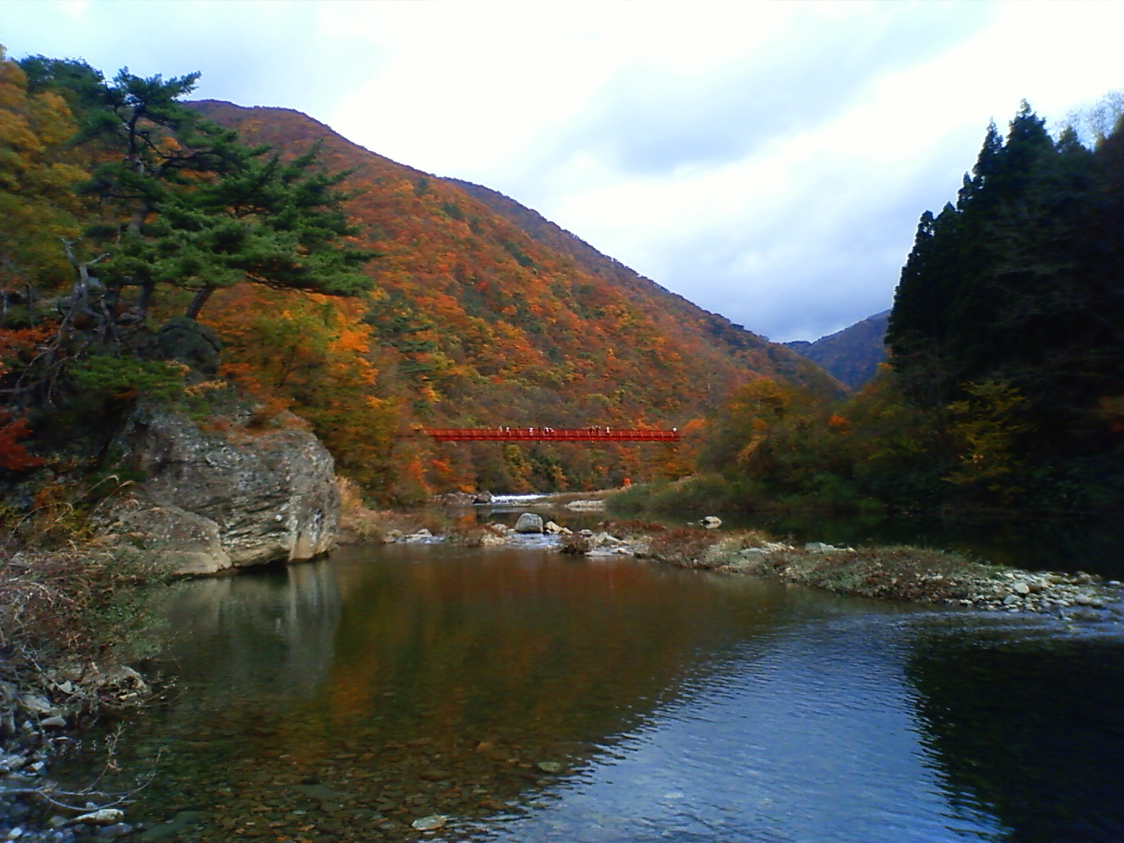 紅葉の抱返り渓谷